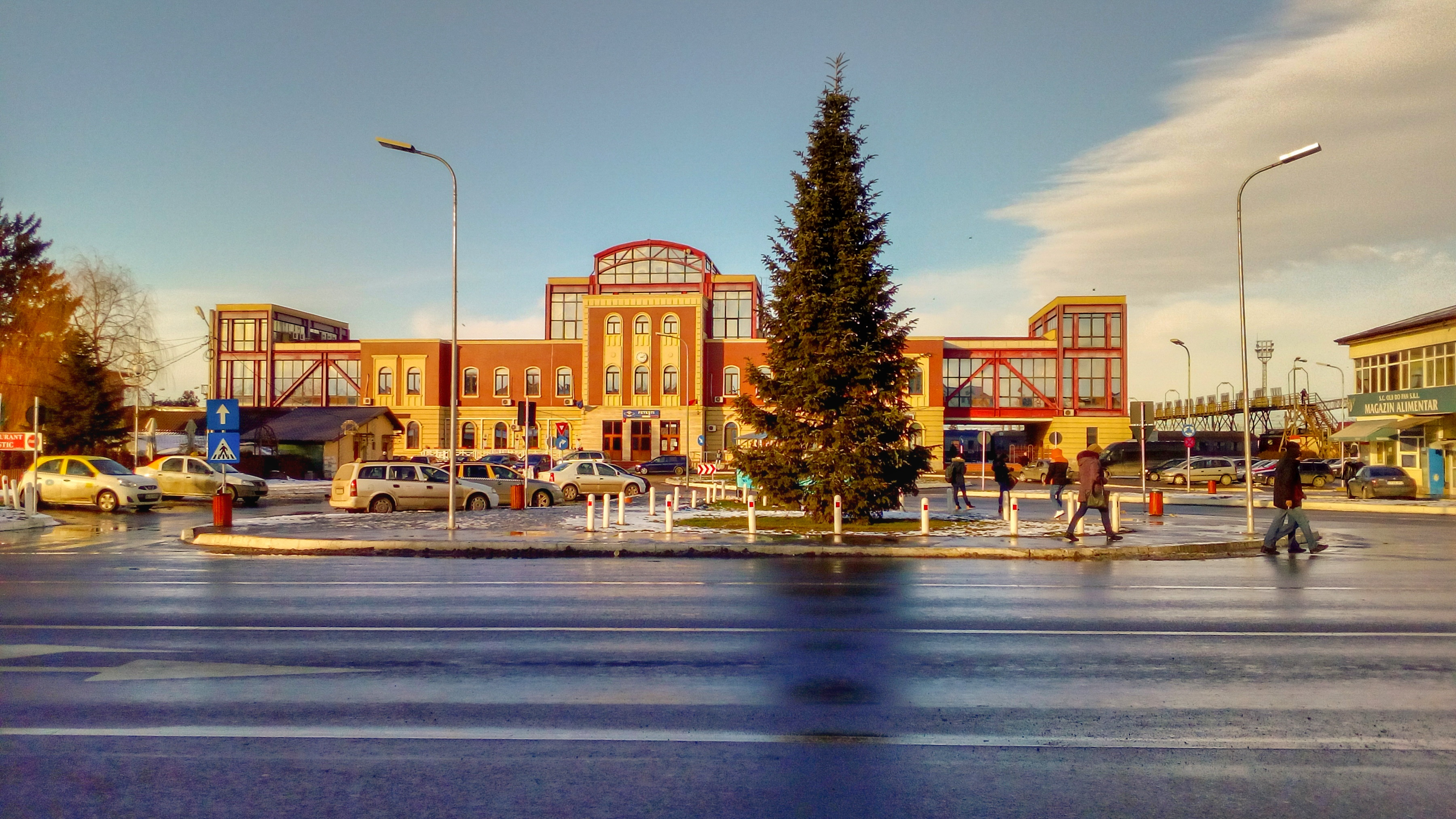 Piata Garii Fetesti, Fetesti-Gara, Judetul Ialomita